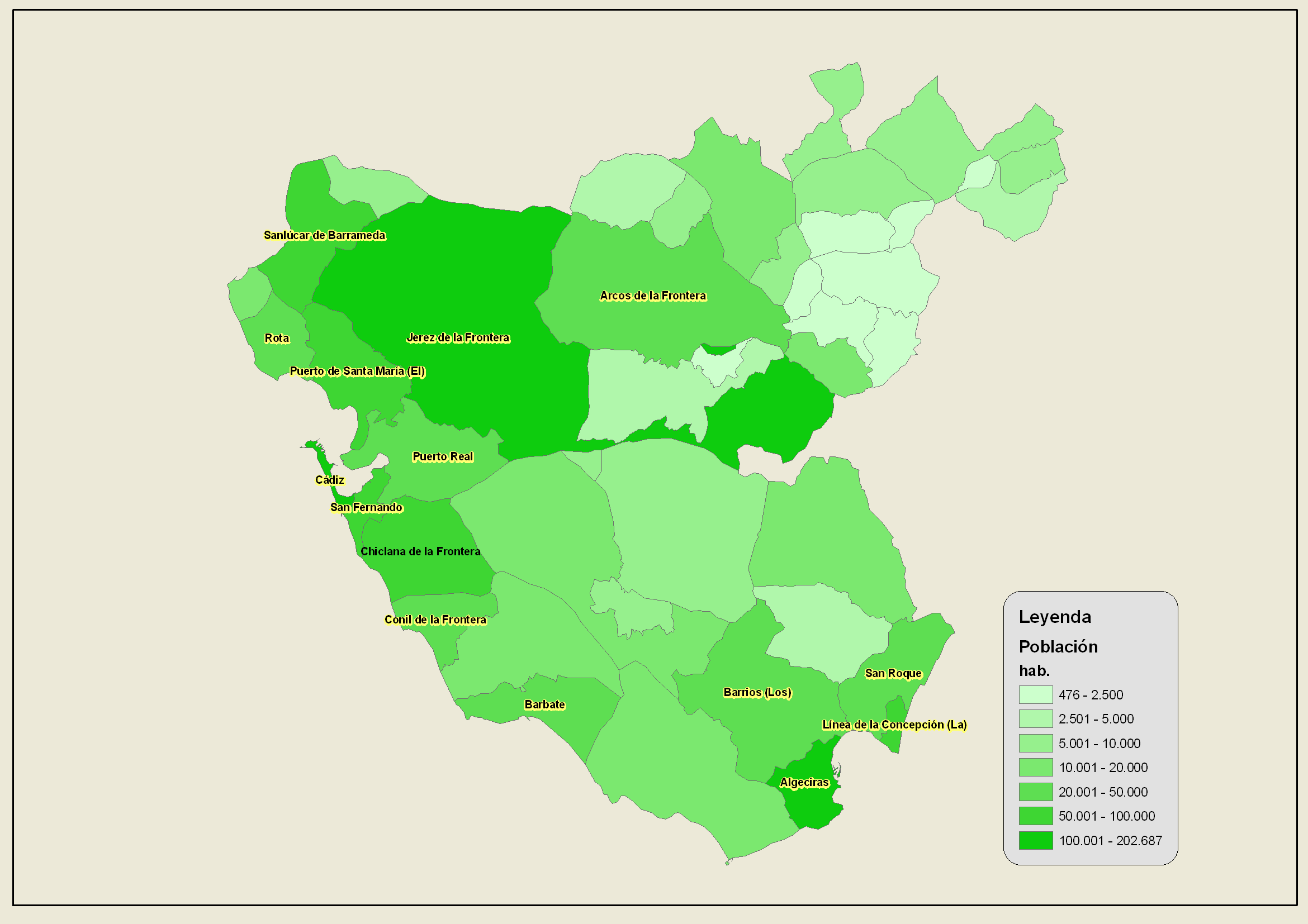 Mapa de población por municipios de la provincia de Cádiz en 2007.